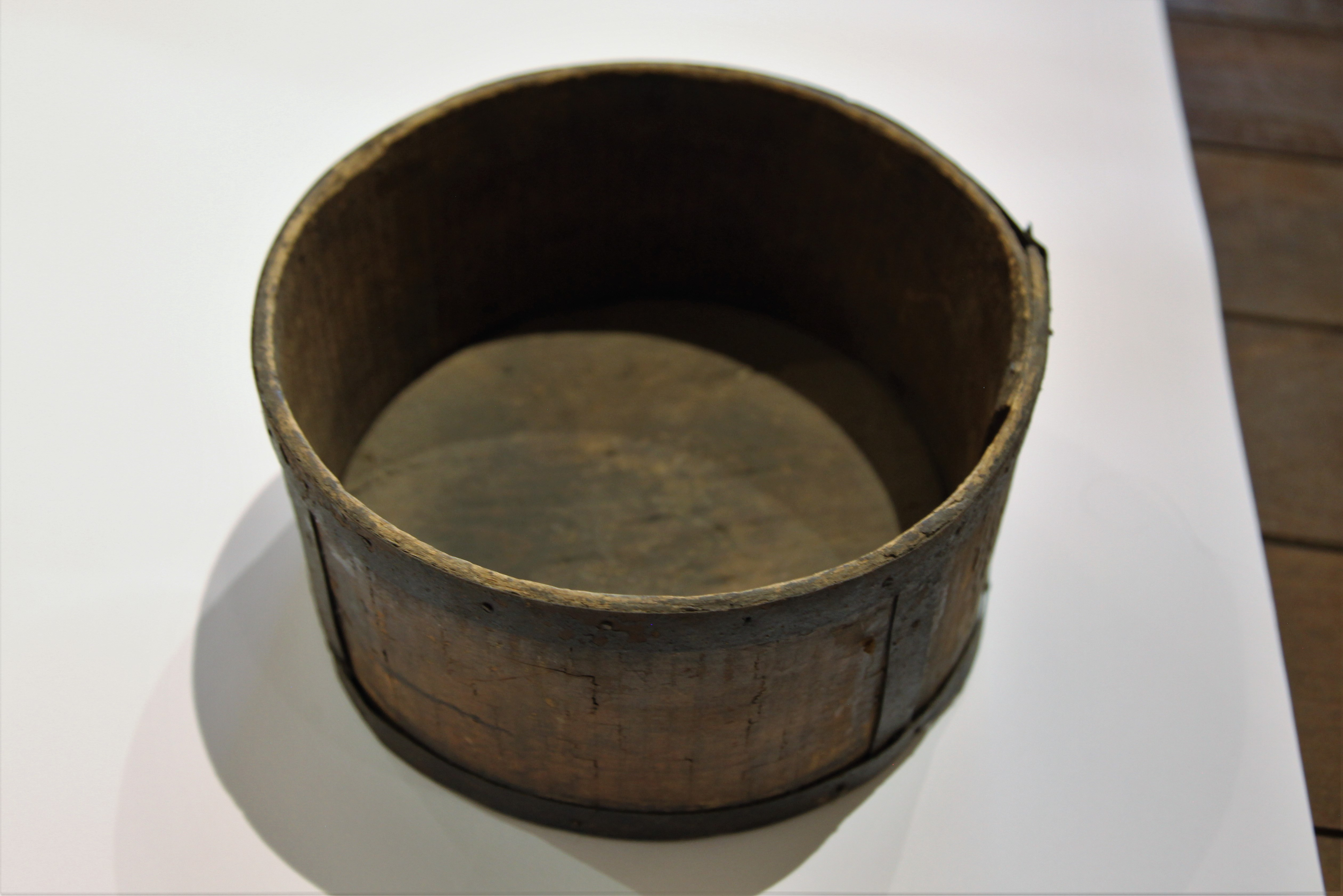 מוזיאון אוצרות בחומה הוא מוזיאון אתנוגרפי שמציג את אורח חייהם של בני העדות השונות, תושבי עכו העתיקה והגליל. המוזייאון נמצא בבורג' אל קומנדר, בפינה הצפון מזרחית שבחומה החיצונית של עכו העתיקה. חיילי עמדה, על תחמושתם, התגורו במבנה המלבני המקומר, המשוקע בתוך החומה, ופתח מחבר בינו לבין העמדה. מתחת למבנה, בבסיס החומה, עוברת מנהרה, באורך של כ-80 מטרים ובגובה של כ-10 מטרים, ששימשה למעבר חיילים והיא מחברת את החפיר הפנימי לחפיר החיצוני.